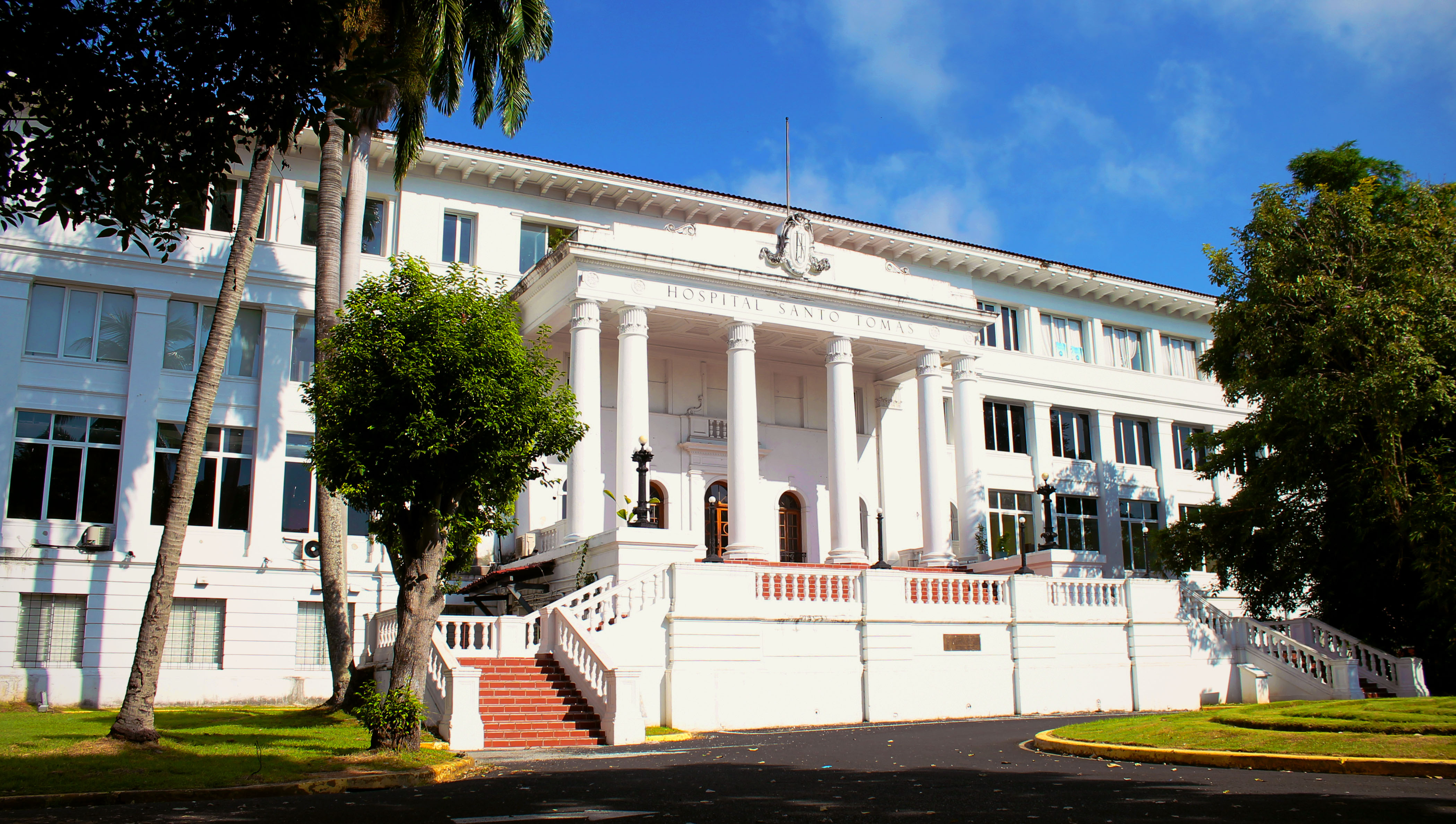 Foto tomada desde el jardín del Hospital Santo Tomás, también conocido como El Elefante Blanco.